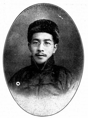 中文（台灣）: 中華民國國會議員